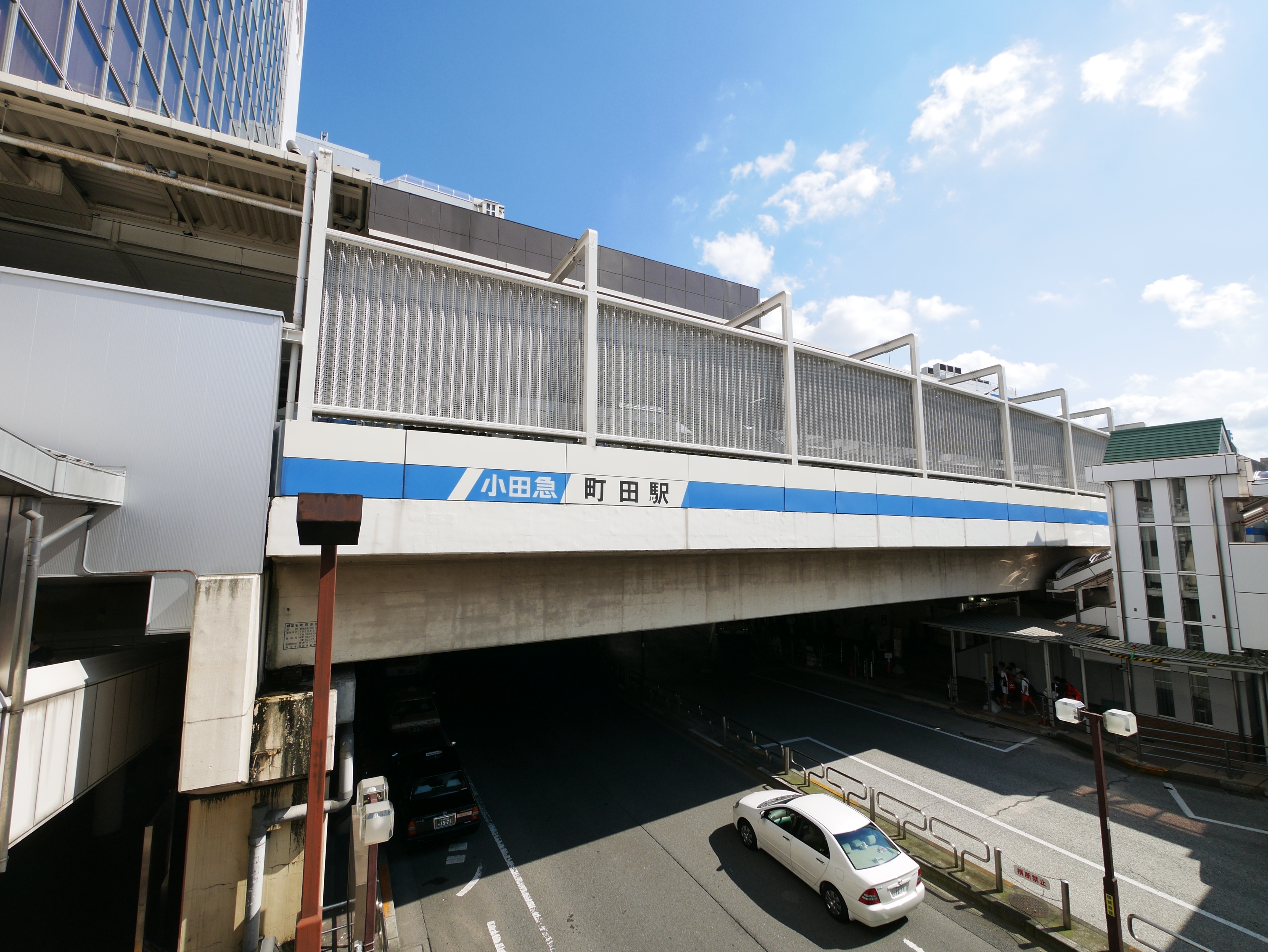 小田急 町田駅